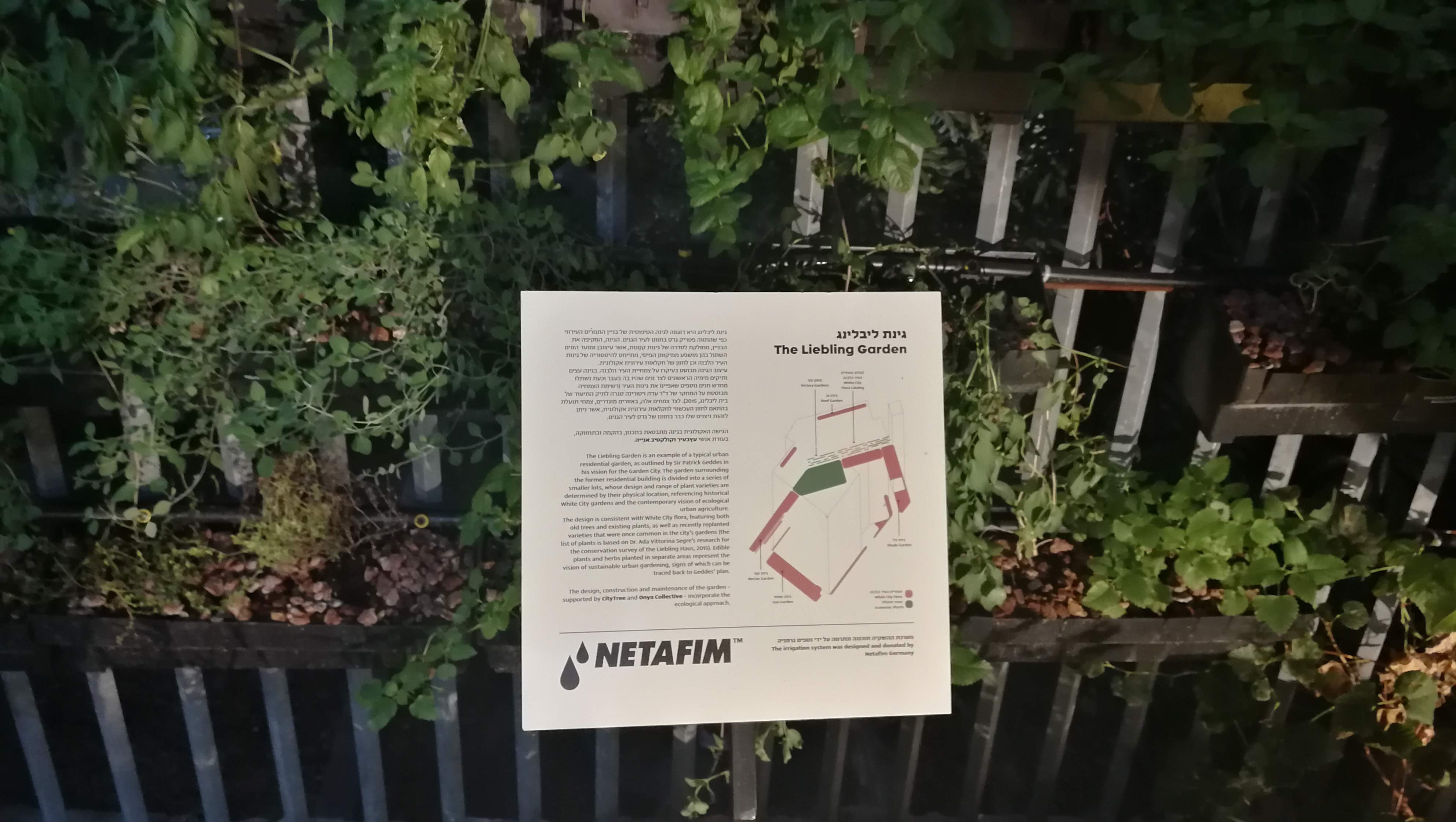 גינה משותפת בבית מקס ליבלינג, מרכז העיר הלבנה, בניין מודרניסטי בסגנון באוהאוס בעל משמעות אדריכלית. הבית ממוקם ברחוב אידלסון 29, תל אביב. תוכנן על ידי האדריכל דב כרמי ונבנה בשנת 1936.